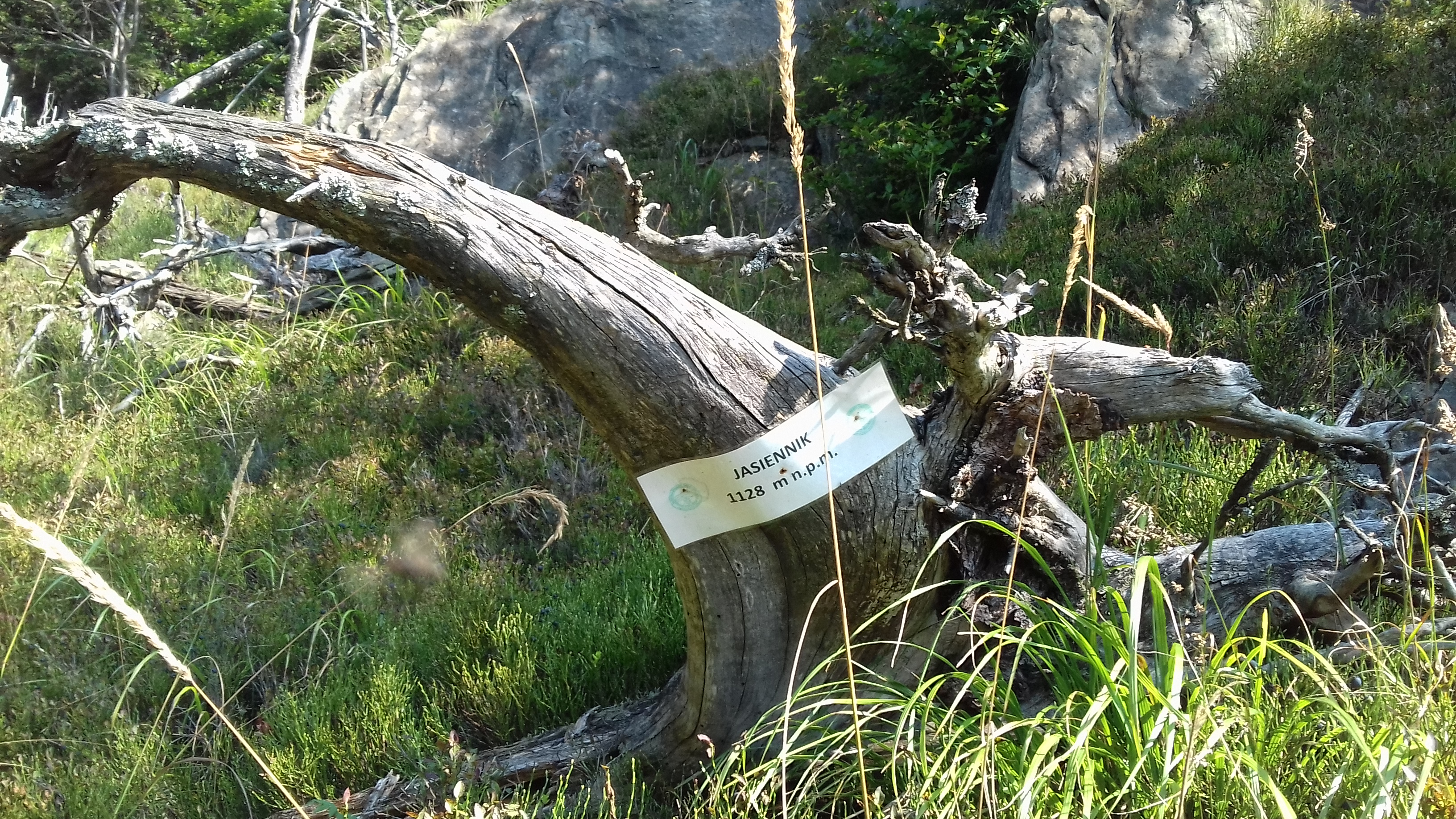 Oznakowanie szczytu przez Nadleśnictwo